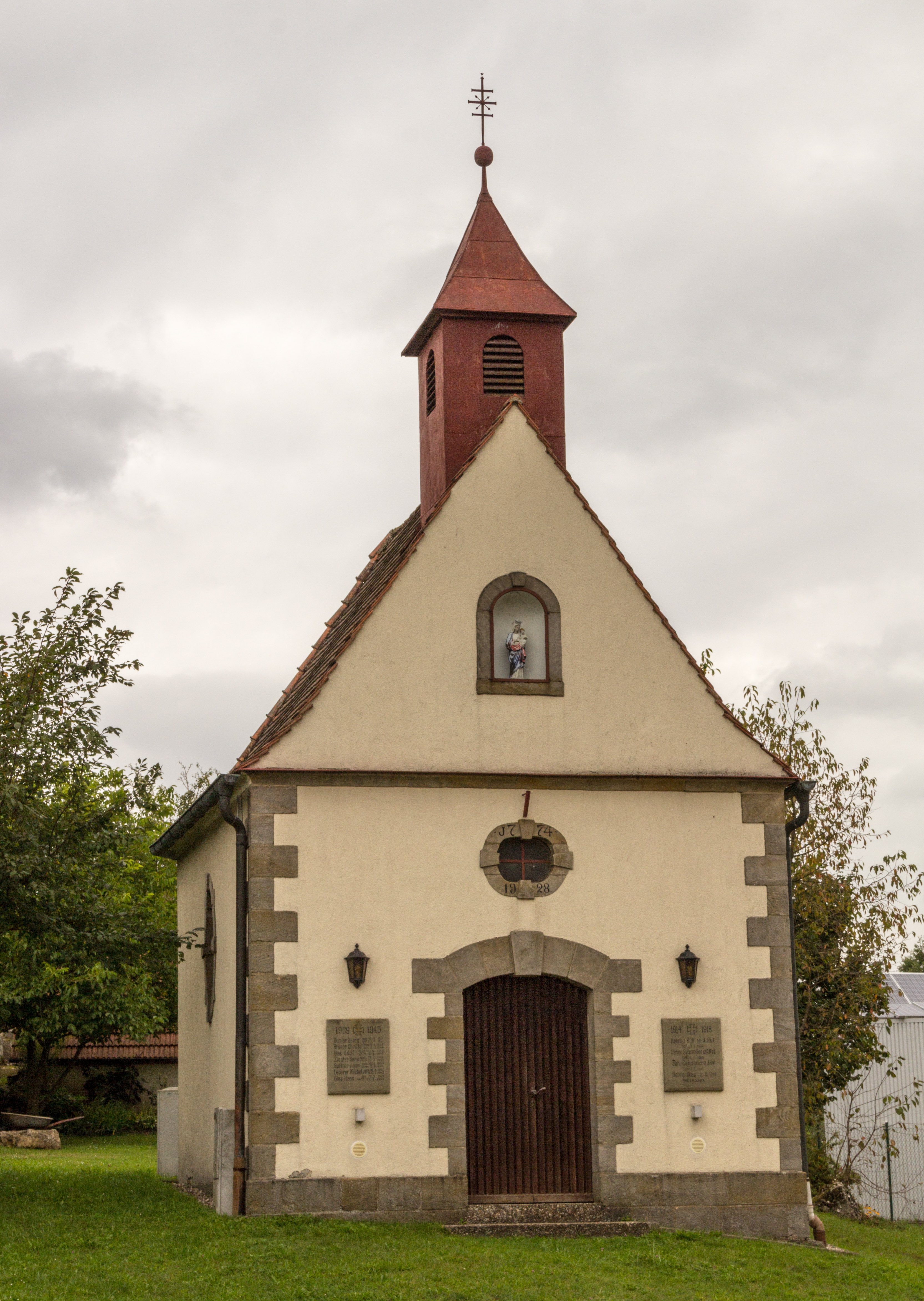 Katholische Ortskapelle, barockisierender Neubau von 1928, mit Dachreiter, bezeichnet „1774“ und „1928“; mit Ausstattung von 1774This is a photograph of an architectural monument.